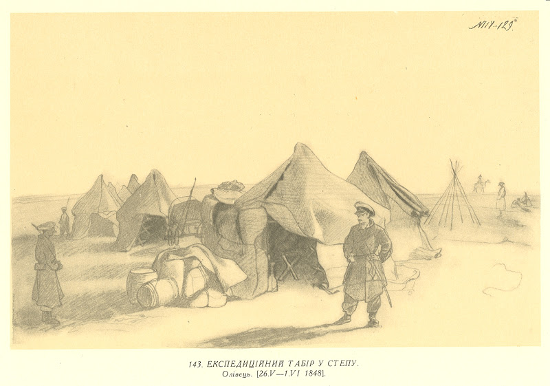 Тарас Шевченко. Експедиційний табір у степу. Папір, олівець (14,7 × 23,2). [26.V — 1.VI 1848].